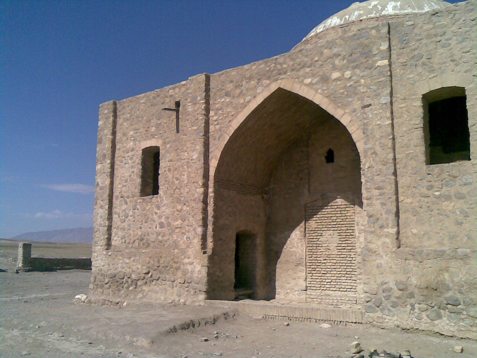 نمای مقبره علامه شهرستانی